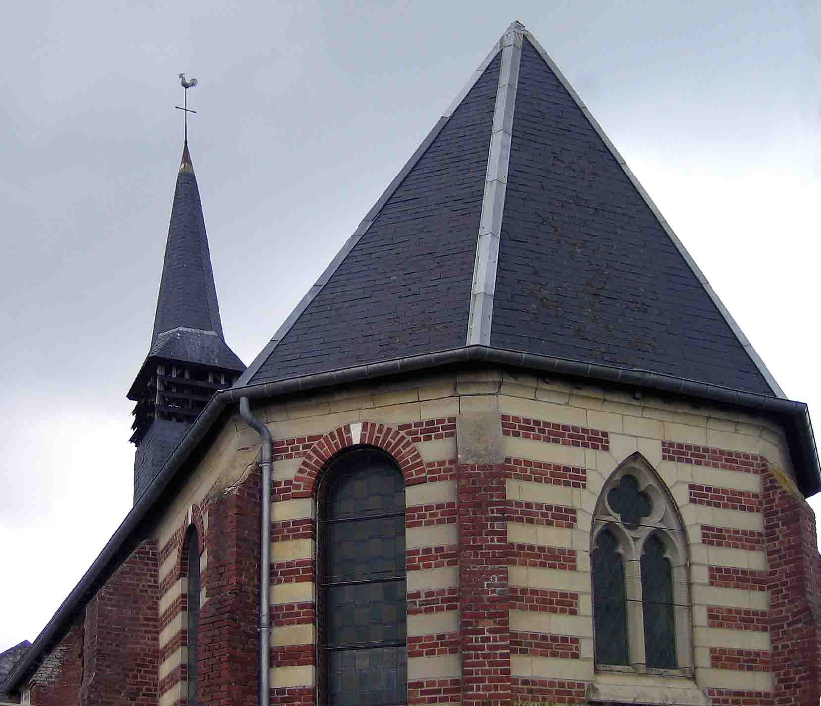 Église de Frettecuisse (Somme). Photo prise en avril 2006 par Marc ROUSSEL.